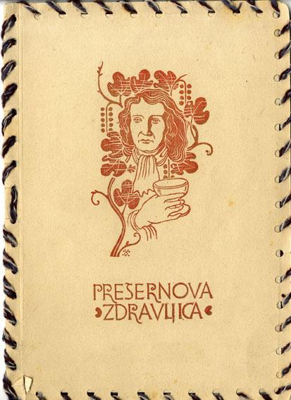 Izdaja Prešernove Zdravljice 1944.